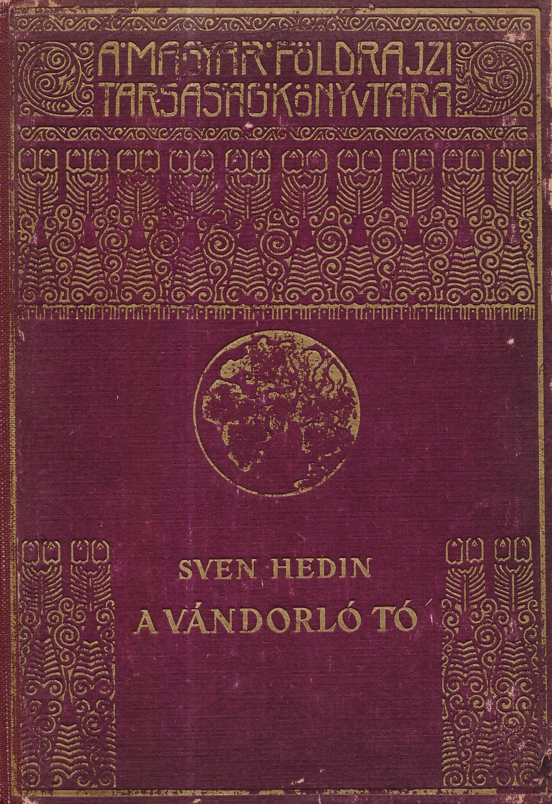 A Magyar földrajzi társaság könyvtárának borítódísze (1920-as évek)